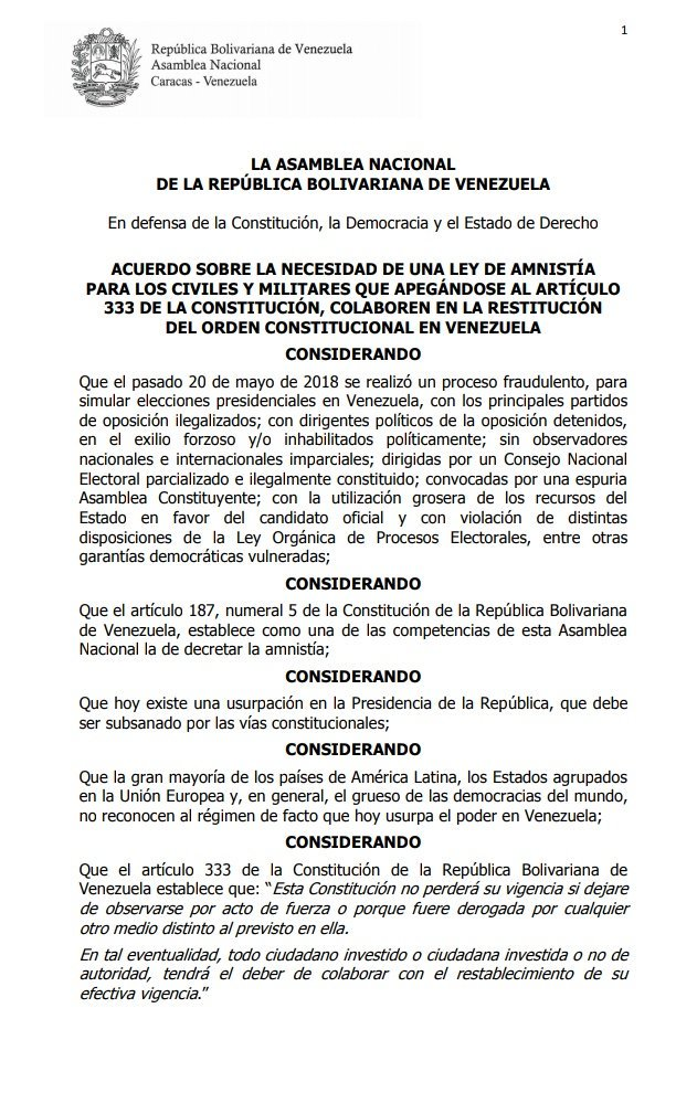 Acuerdo sobre la necesidad de una ley de amnistía para los civiles y militares que apegándose al artículo 333 de la constitución, colaboren en la restitución del orden constitucional en Venezuela - Página 1